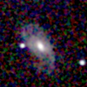 Galaxy NGC 66